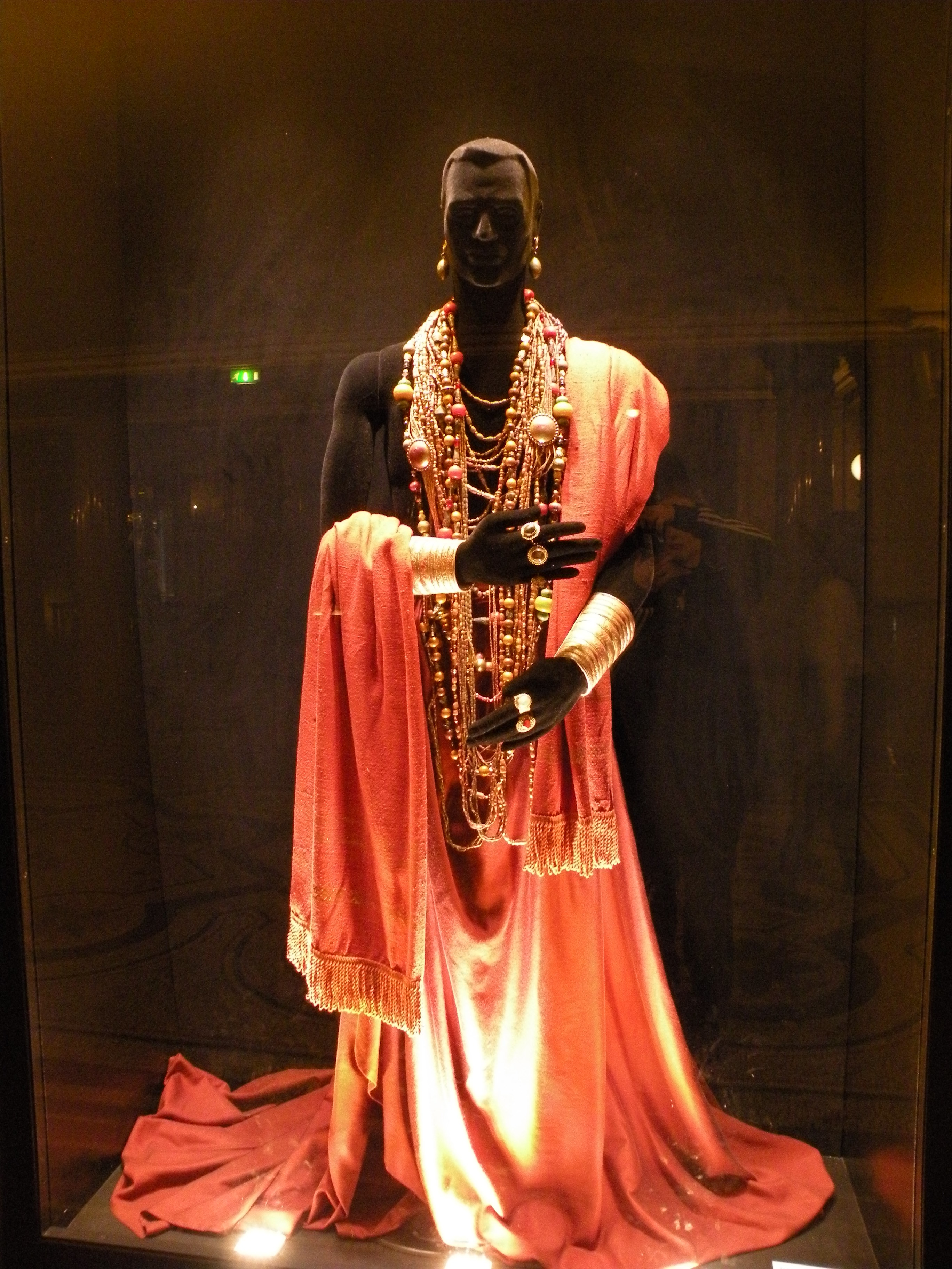 opéra garnier collection de costume